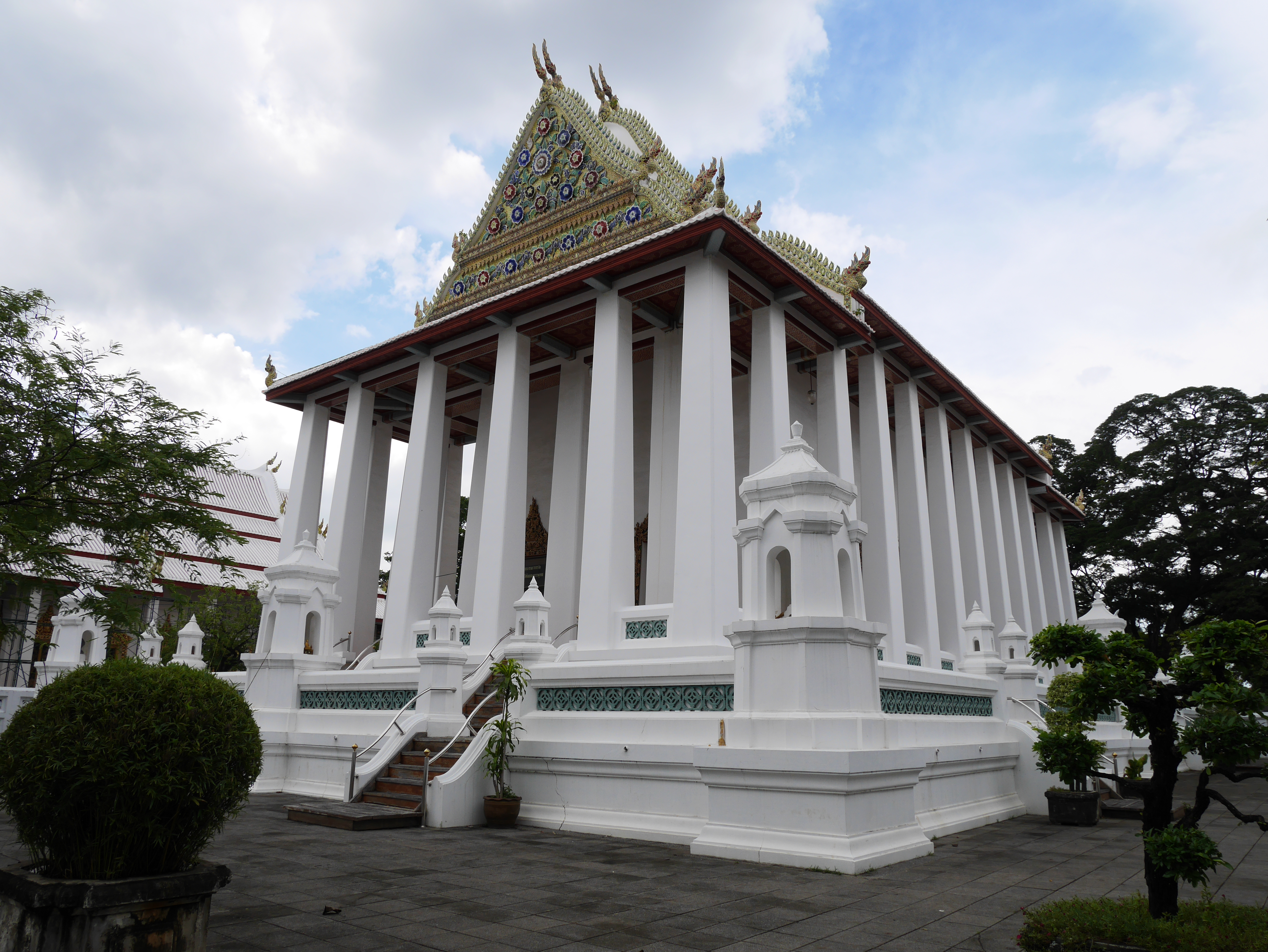 วัดเฉลิมพระเกียรติวรวิหาร